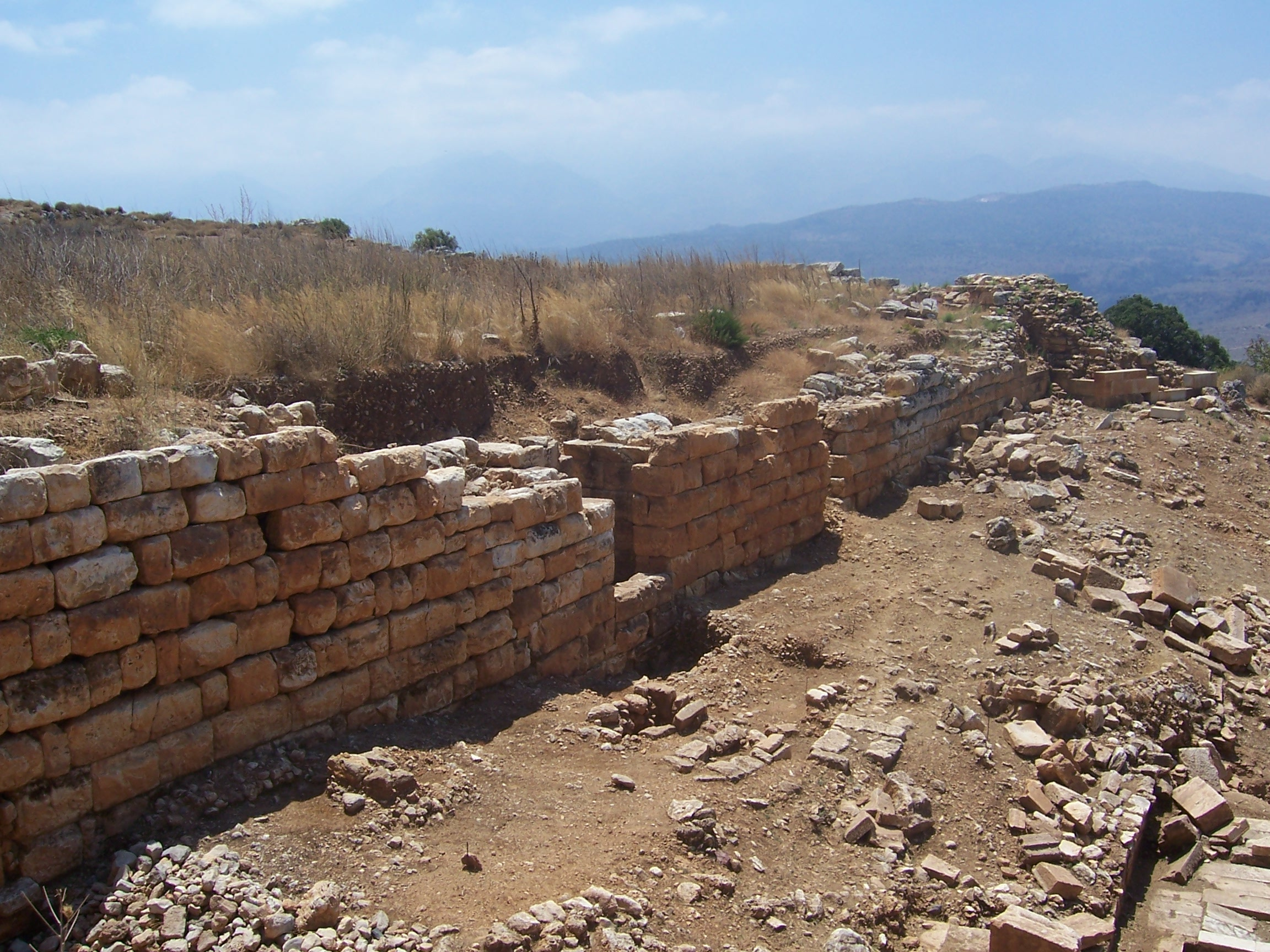 Mur d'enceinte d'Aptera (Crète).